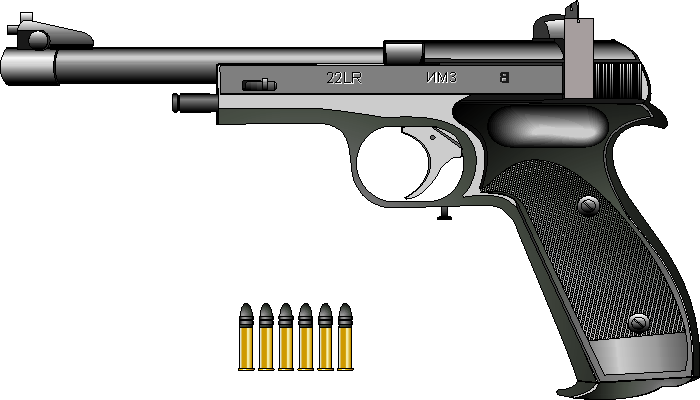 5,6 mm pistolet MCM Margolin (Rosja).